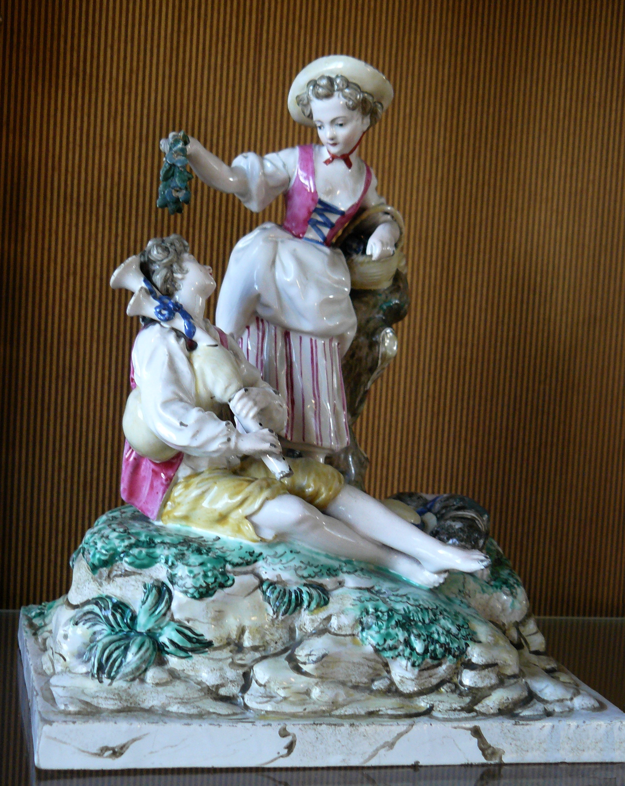 Statuette "femme couronnant un musicien" - Terre de Lorraine à émail stannifère, Lunéville ou sa région, vers 1770-1780, hauteur environ 12 cm - Musée national de céramique, Sèvres (Hauts-de-Seine, France) - Inv n° MNC 3756